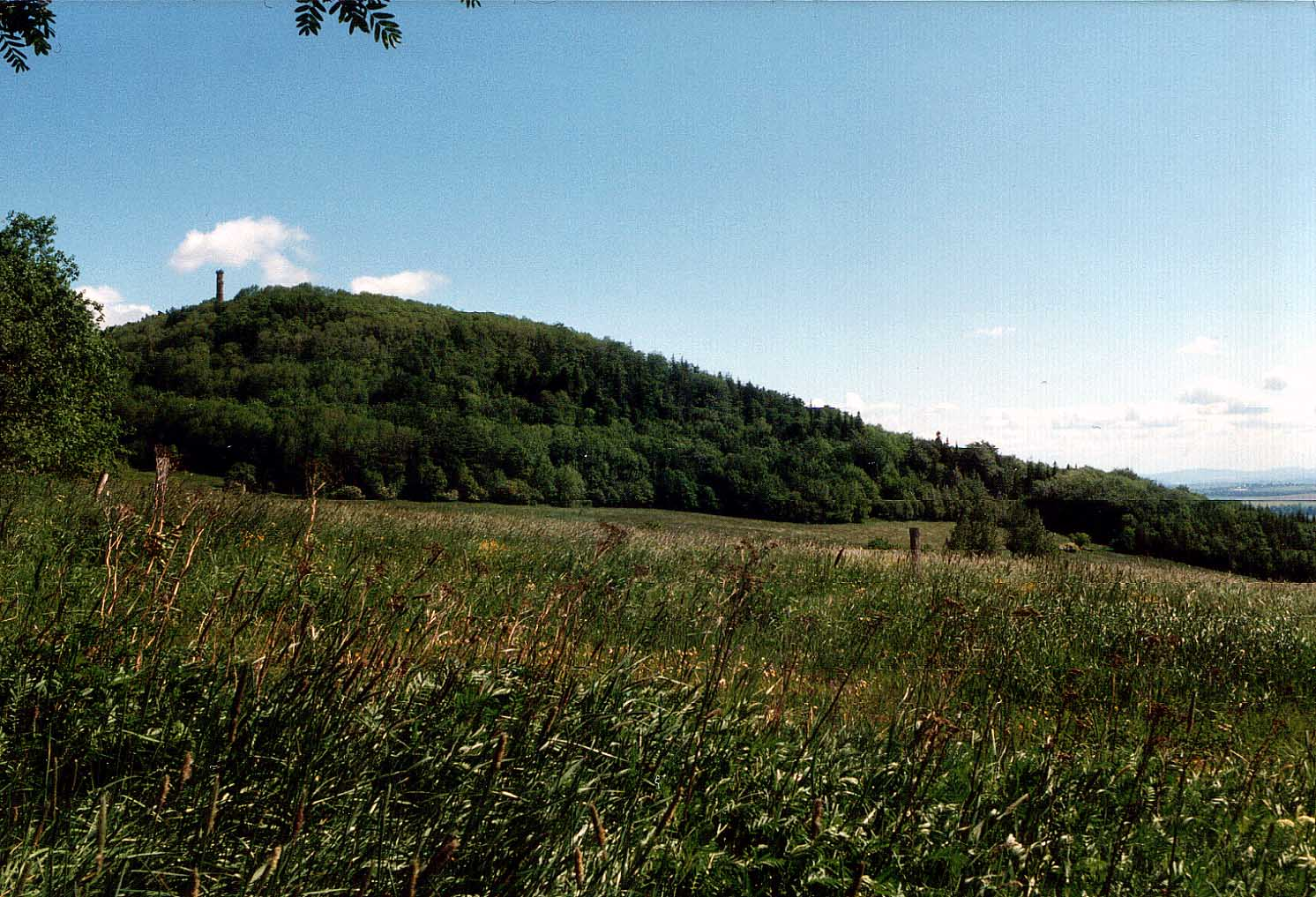 Geisingberg Selbst fotografiert im Sommer 1995 Fotograf: Hejkal